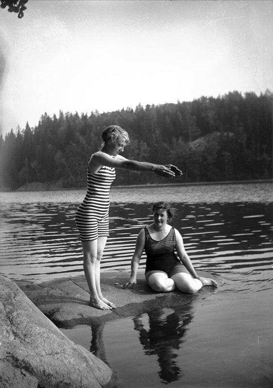 Två kvinnor i baddräkt på sten vid vattnet. Den ena gör sig beredd att dyka i.